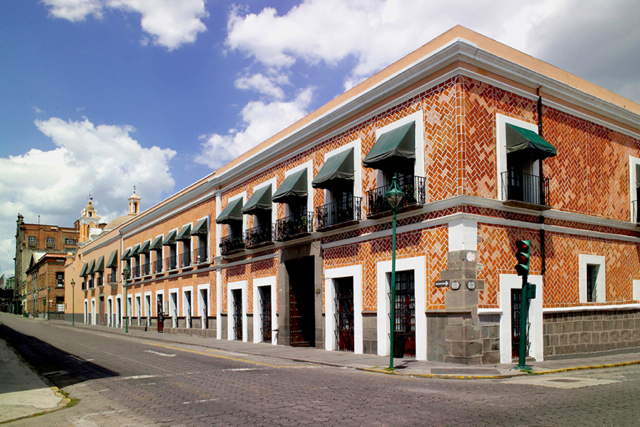 Fachada del Museo Amparo